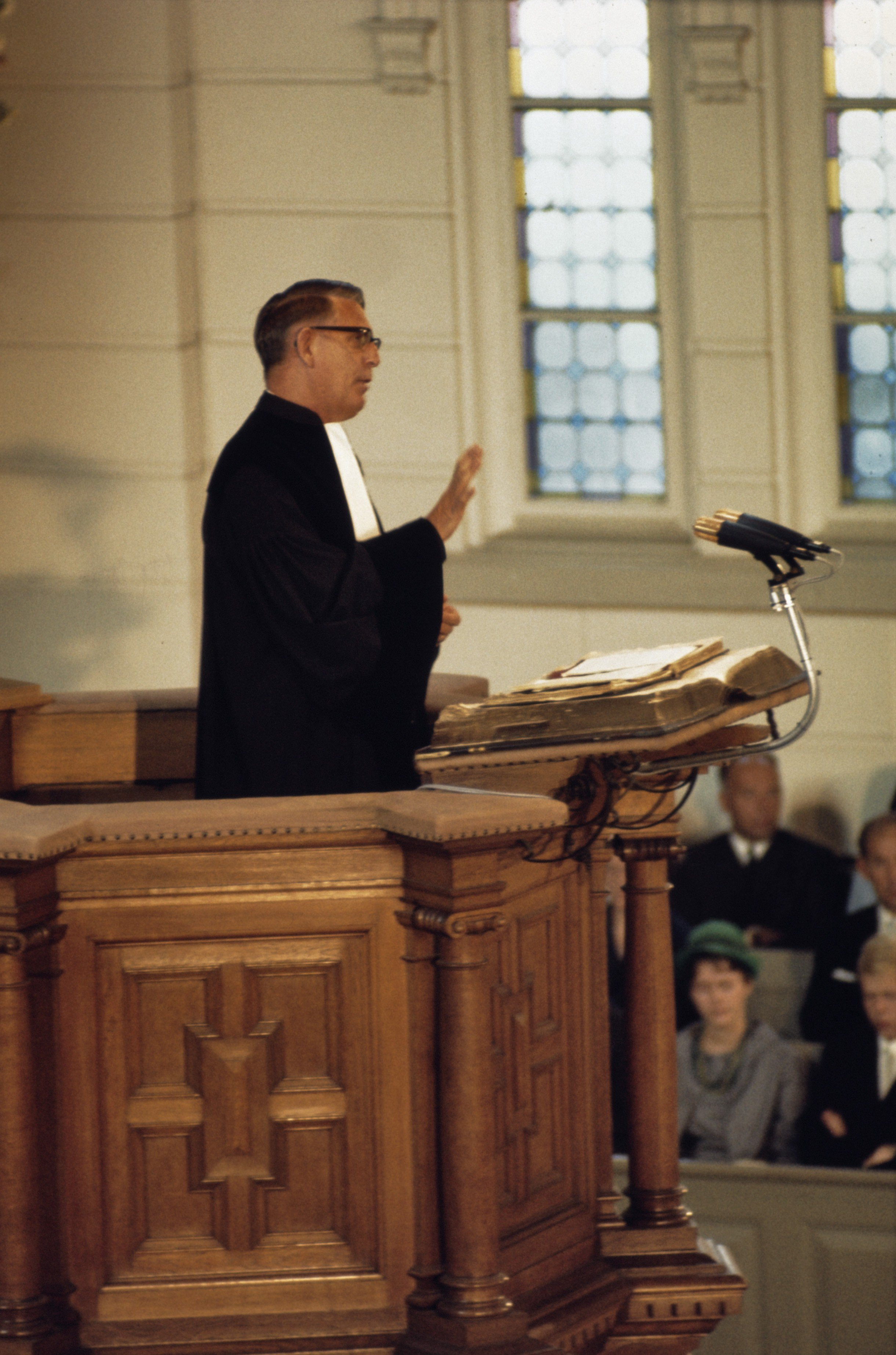 Collectie / Archief : Fotocollectie Anefo Reportage / Serie : [ onbekend ] Beschrijving : Doop van Prins Maurits in de Grote Kerk te Apeldoorn; ds.dr. H. Berkhoff tijdens preek Datum : 10 september 1968 Trefwoorden : Doopplechtigheden, koninklijke familie, prinsen Persoonsnaam : Maurits, prins Fotograaf : Kroon, Ron / Anefo Auteursrechthebbende : Nationaal Archief Materiaalsoort : Dia (kleur) Nummer archiefinventaris : bekijk toegang 2.24.01.06 Bestanddeelnummer : 254-8166